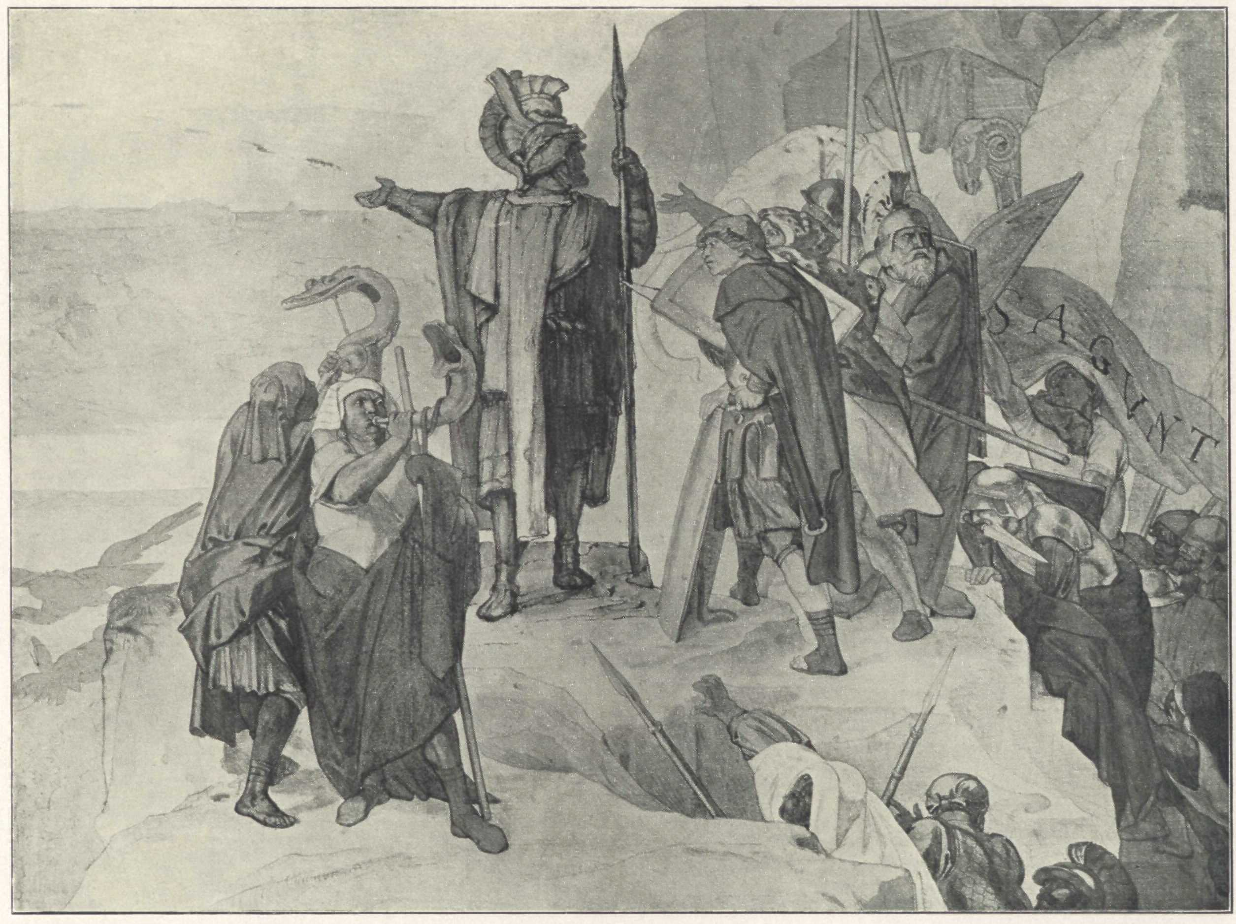 6. Italien in Sicht (lt. Quelle) Bildbeschreibung im Artikel Alfred Rethel in der ADB: 6) Hannibal zeigt seinem Heere von der Höhe der Berge herab die Gefilde Italiens.Blatt 1 Blatt 2 Blatt 3 Blatt 4 Blatt 5 Blatt 6 der Serie